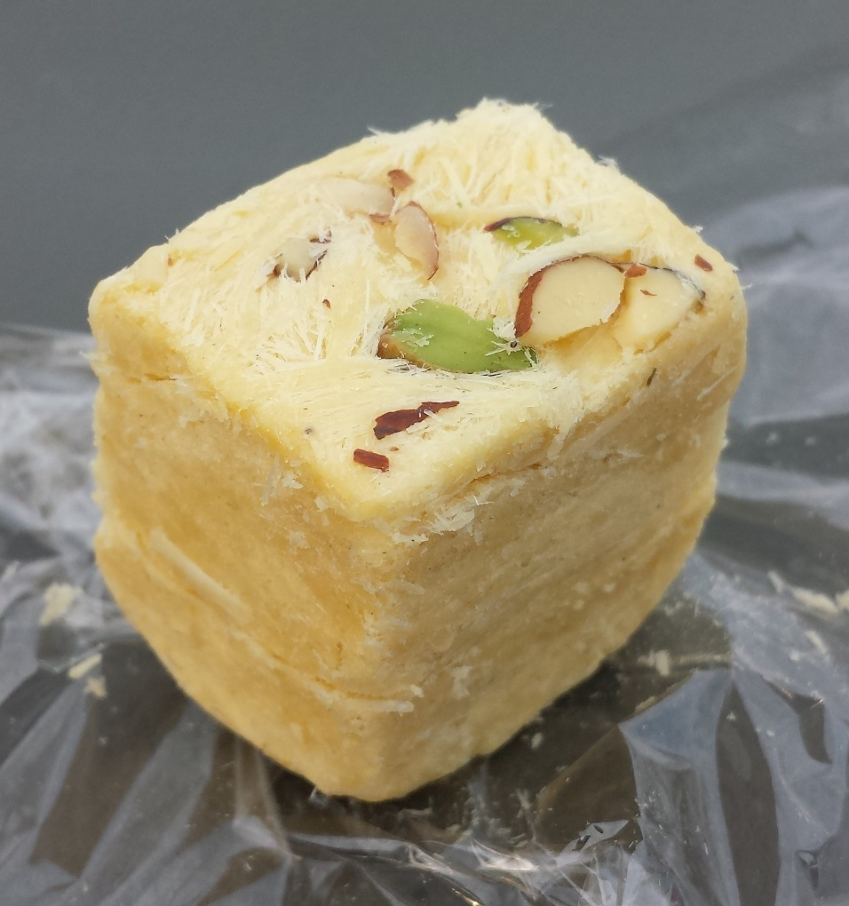 インドのお菓子 ソアン・パプディ